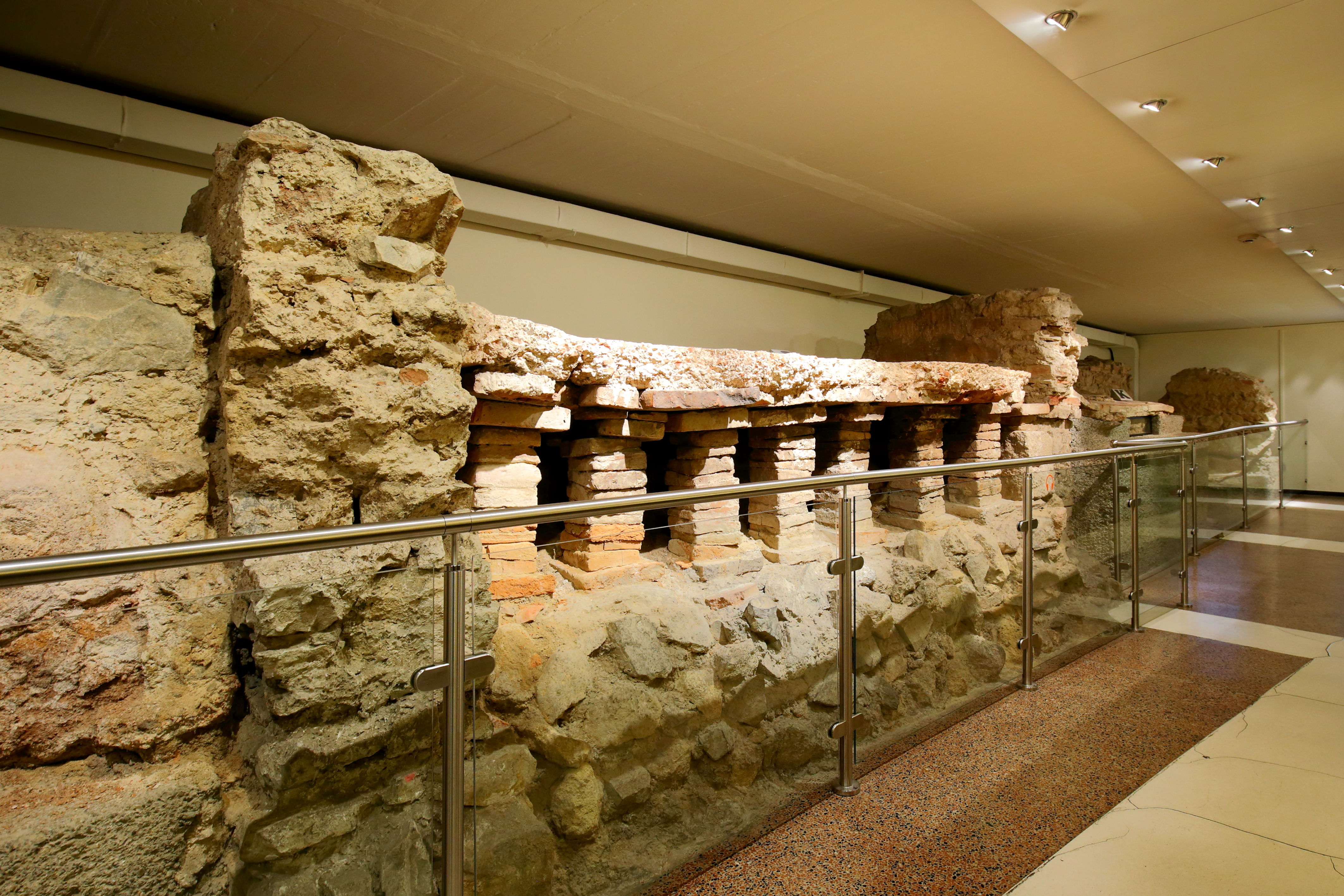 Bodenheizung (Hypokaustum) eines Tribunenhauses im Untergeschoß des Römermuseums im 1. Wiener Gemeindebezirk Innere Stadt an der Adresse Hoher Markt 3.